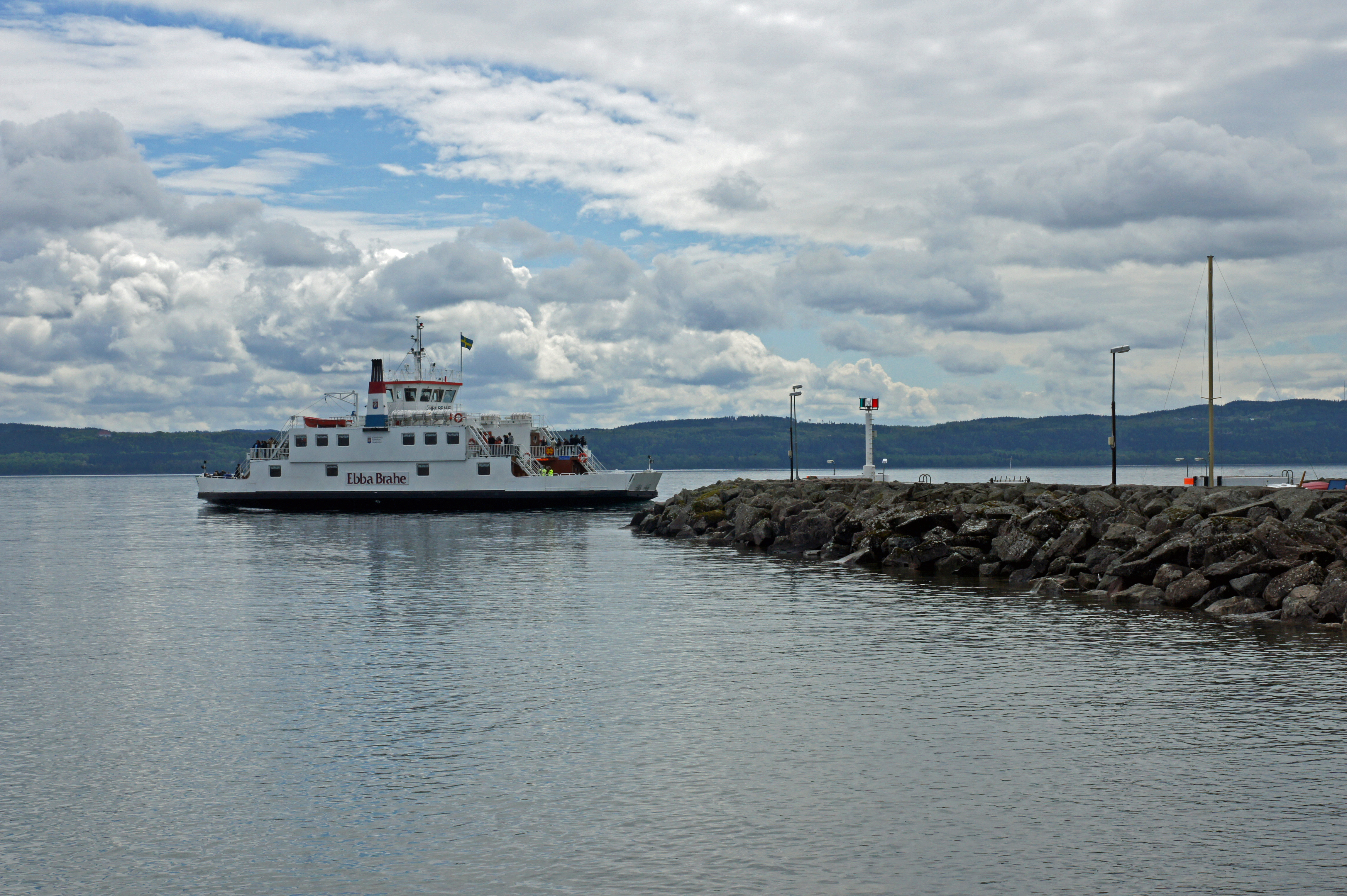 2010-05-22 06-05 Schweden 0305 Vättern, Visingsö